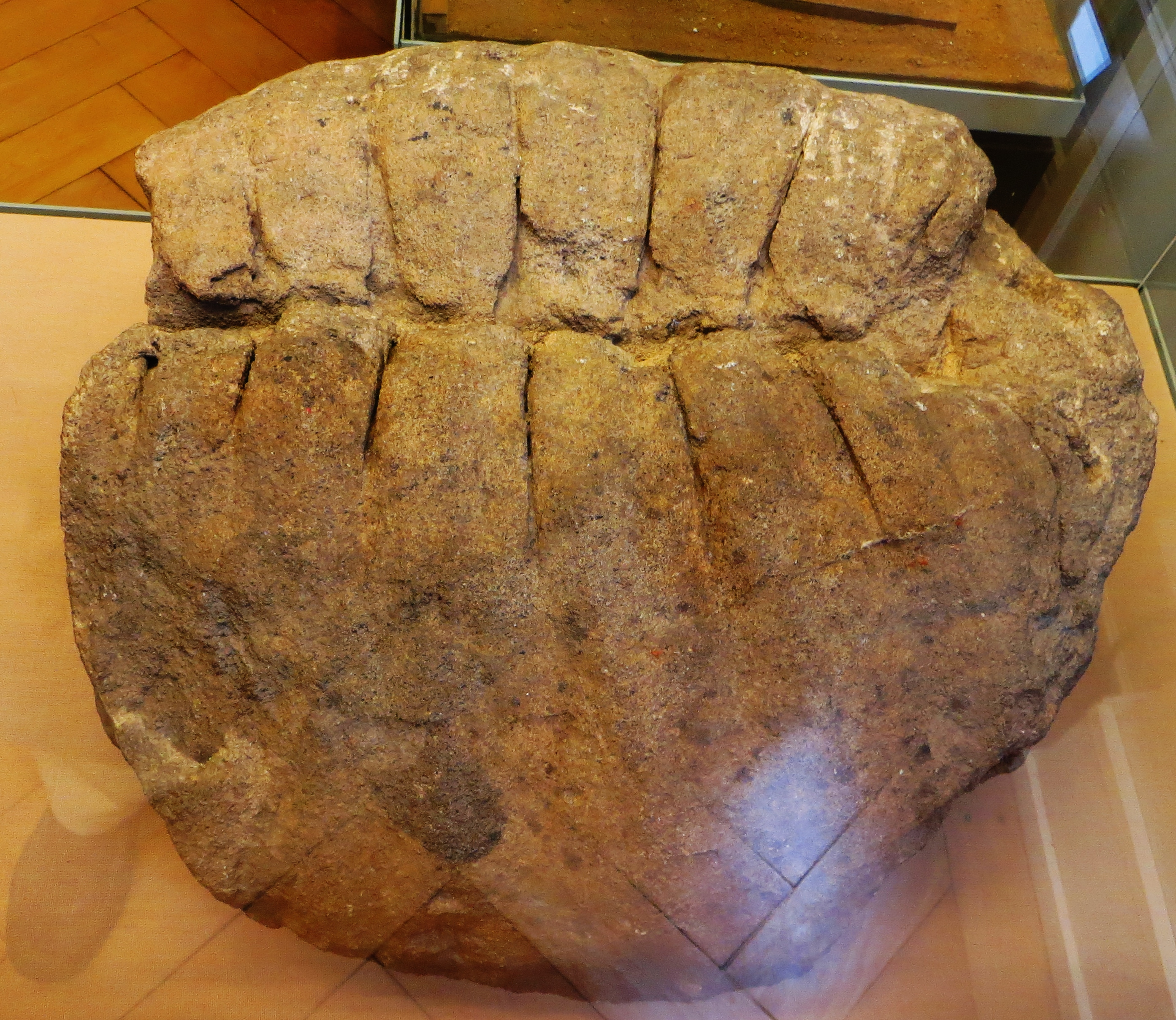 Fossil of Proganochelys, an extinct reptile - Took the picture at Museum of Paleontology, Tuebingen